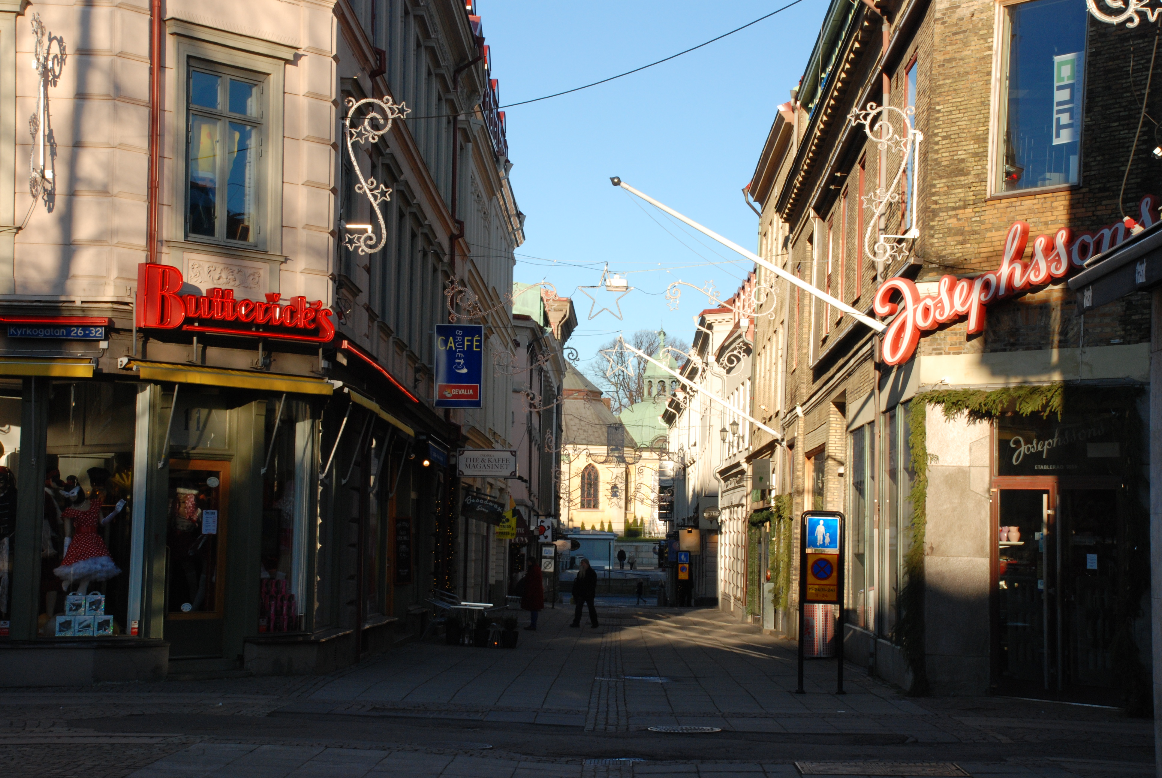 Korsgatan i Göteborg från Domkyrkan i riktning mot Södra Hamngatan. Unknown